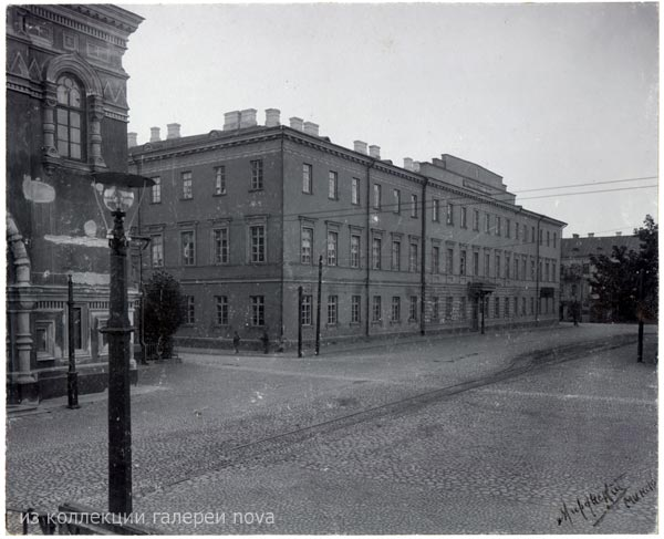 Рыгор Міранскі. Будынак Мінскіх губернскіх прысутных месцаў. Пач. XX ст. 21.5 х 25.7; 16.3 х 20.1.